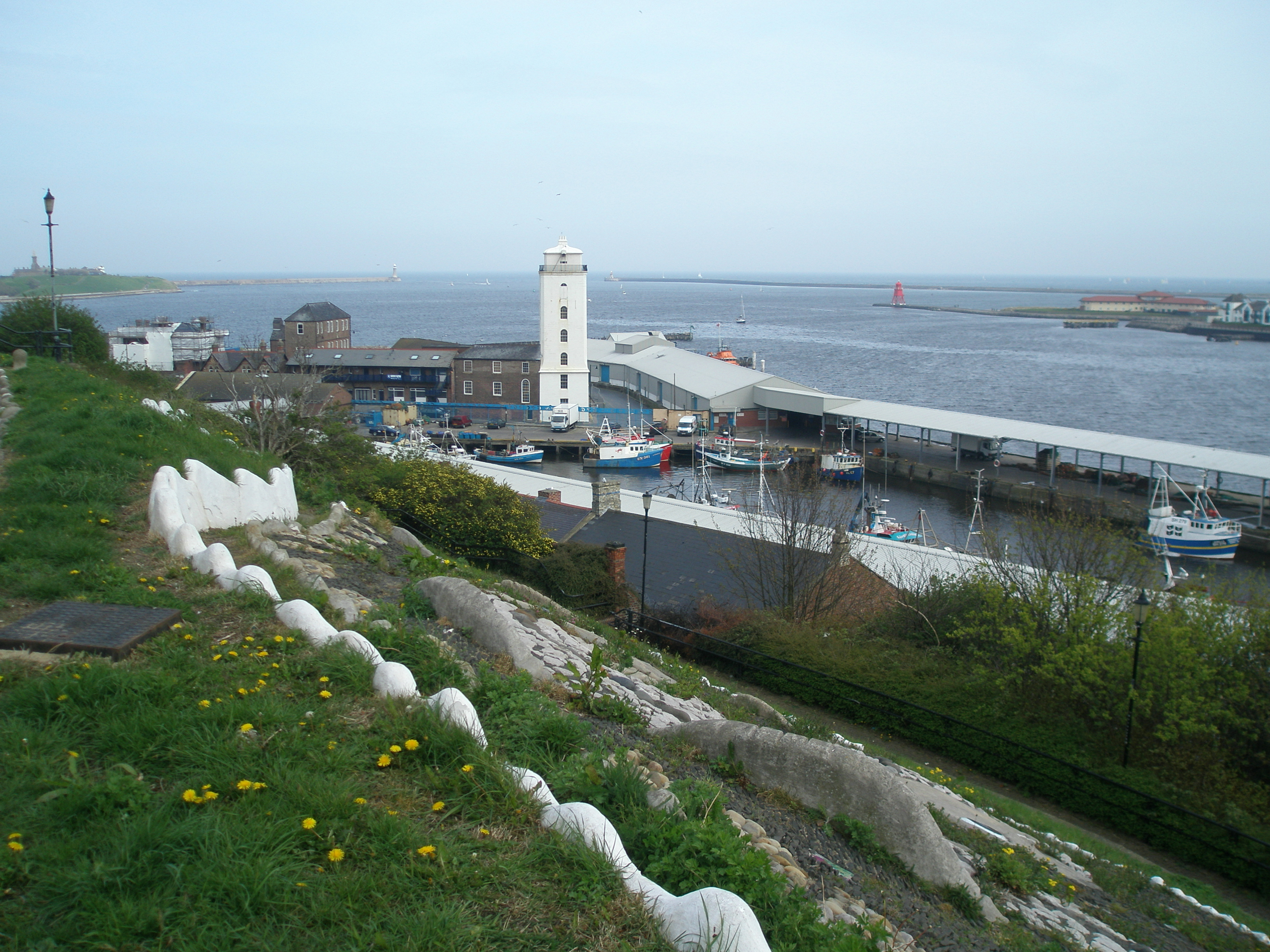 North Shieldsin kalasatamaa.